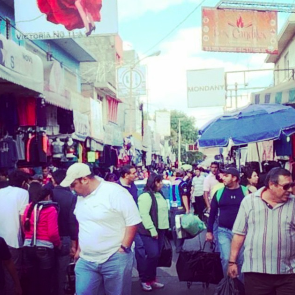 Vista de la Zona Comercial Textil en Uriangato, Gto.